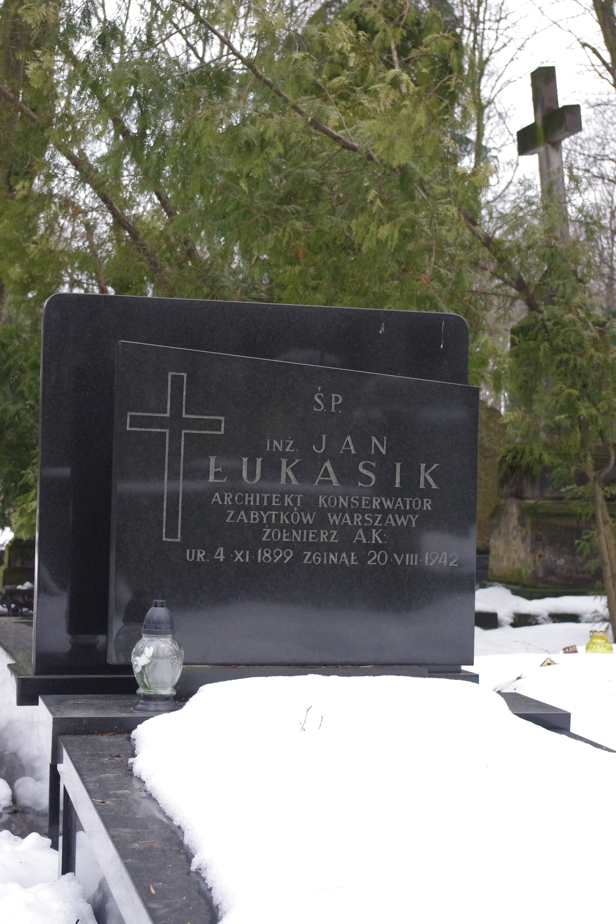 Grób konserwatora zabytków Jana Łukasika (1899-1942) na Cmentarzu Powązkowskim w Warszawie